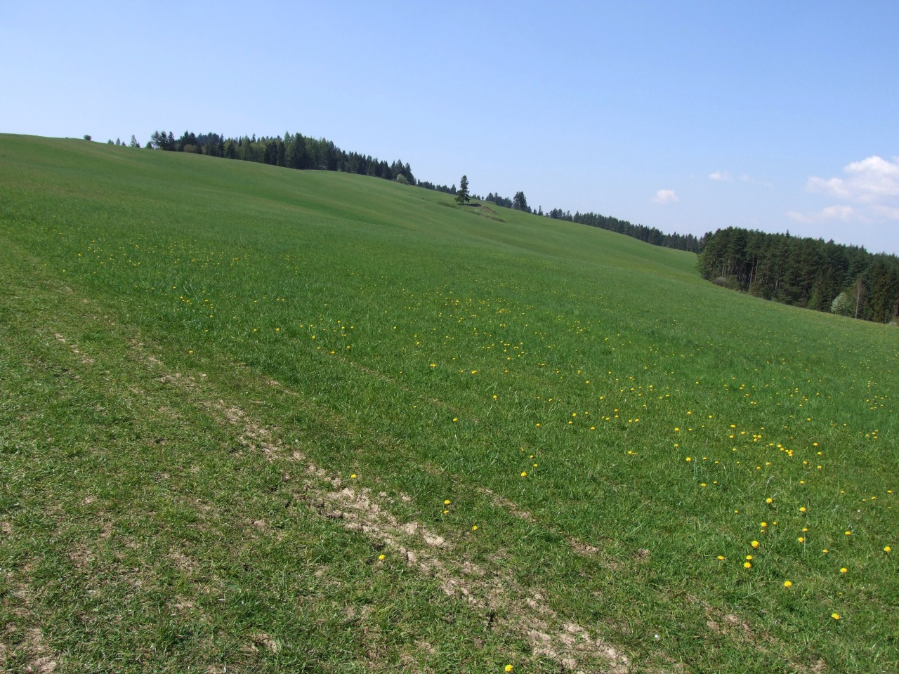 Polana Cisówka w Pieninach Spiskich